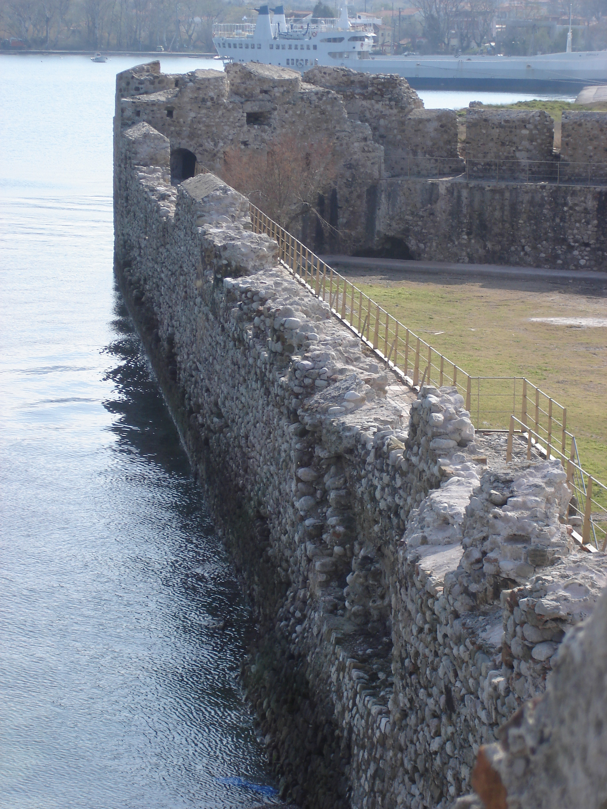 Rio castle Greece Το κάστρο του Ρίου, Οθωμανικό θαλάσσιο τείχος